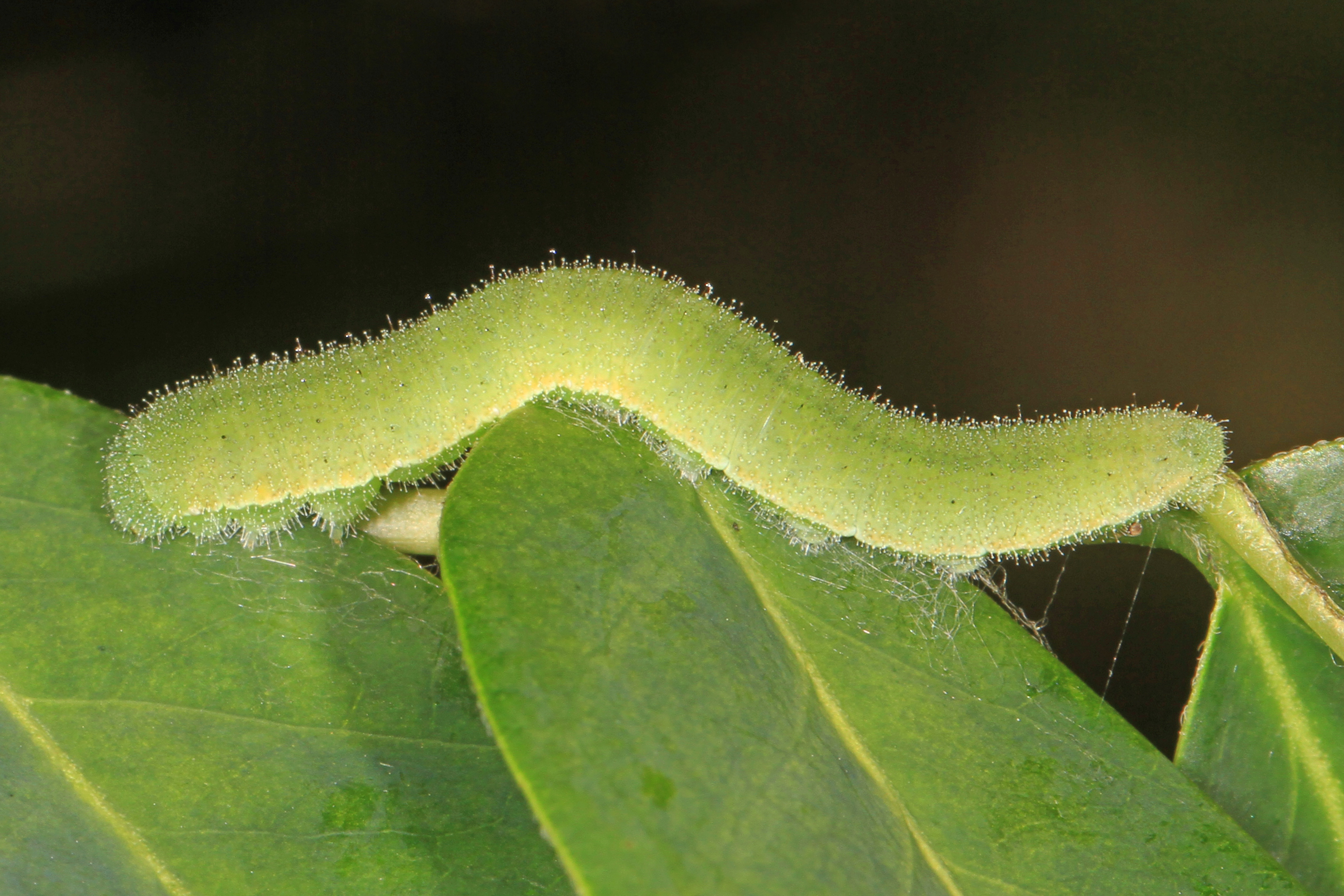 Sleepy Orange caterpillar - Abaeis nicippe, Lovettsville, Virginia